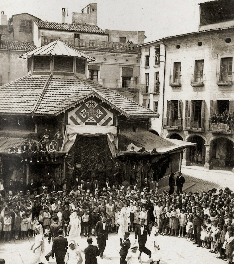 Edifici del Mercat Cobert d'Igualada, anomenat popularment "la Pajarera", projectat el 1905 pels arquitectes Pau Salvat i Espasa i Isidre Gili i Moncunill, i construït el 1910. Foto feta durant una actuació de l'Esbart de Dansaires d'Igualada, el 10 de maig de 1934. Estava situat a la plaça de l'ajuntament d'Igualada, i posteriorment fou enderrocat.